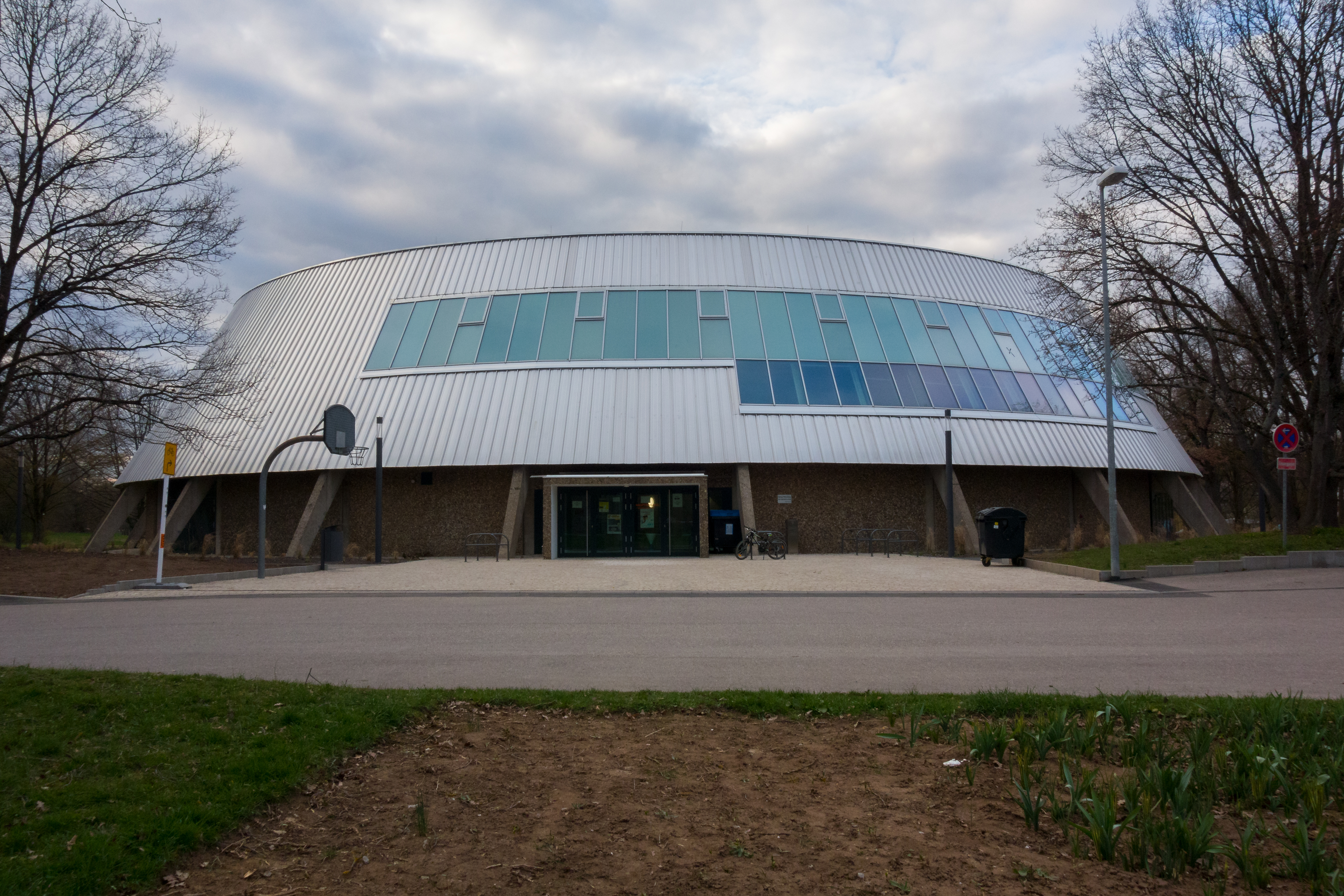 Rundsporthalle in Waiblingen